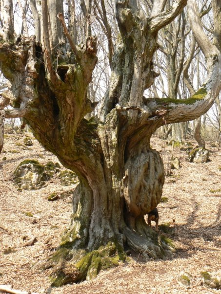 Jeden zo živých symbolov Horného vrchu - najstarší hrab na planine. Strom je prestúpený množstvom dutín, vďaka ktorým pri katabatickom prúdení vzduchu strom vydáva zvuky - "hudie". V jeho korune sa pohodlne pomestí aj 10 ľudí. Jeho vek možno odhadovať na 200 i viac rokov. Veľkosť možno odhadnúť podľa siluety psa vpravo dolu.